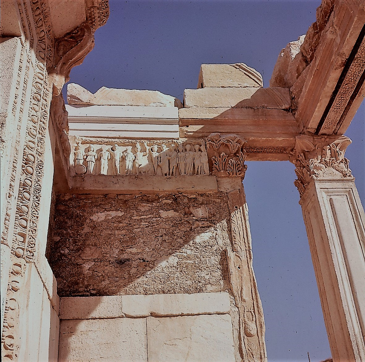 Servizio fotografico : Efeso, 1962 / Paolo Monti. - Buste: 3, Fototipi: 3 : Diapositiva, sviluppo cromogeno/ pellicola ; 6x6. - ((Serie costituita da 3 diapositive identificate con i nn.: 1251-1253. Sulla busta RC1251 manoscritto: "Grecia". La suddetta serie è contenuta nella scatola identificata con la numerazione RC1099/RC1260. Sul coperchio della scatola manoscritto: "Località varie - Sud".